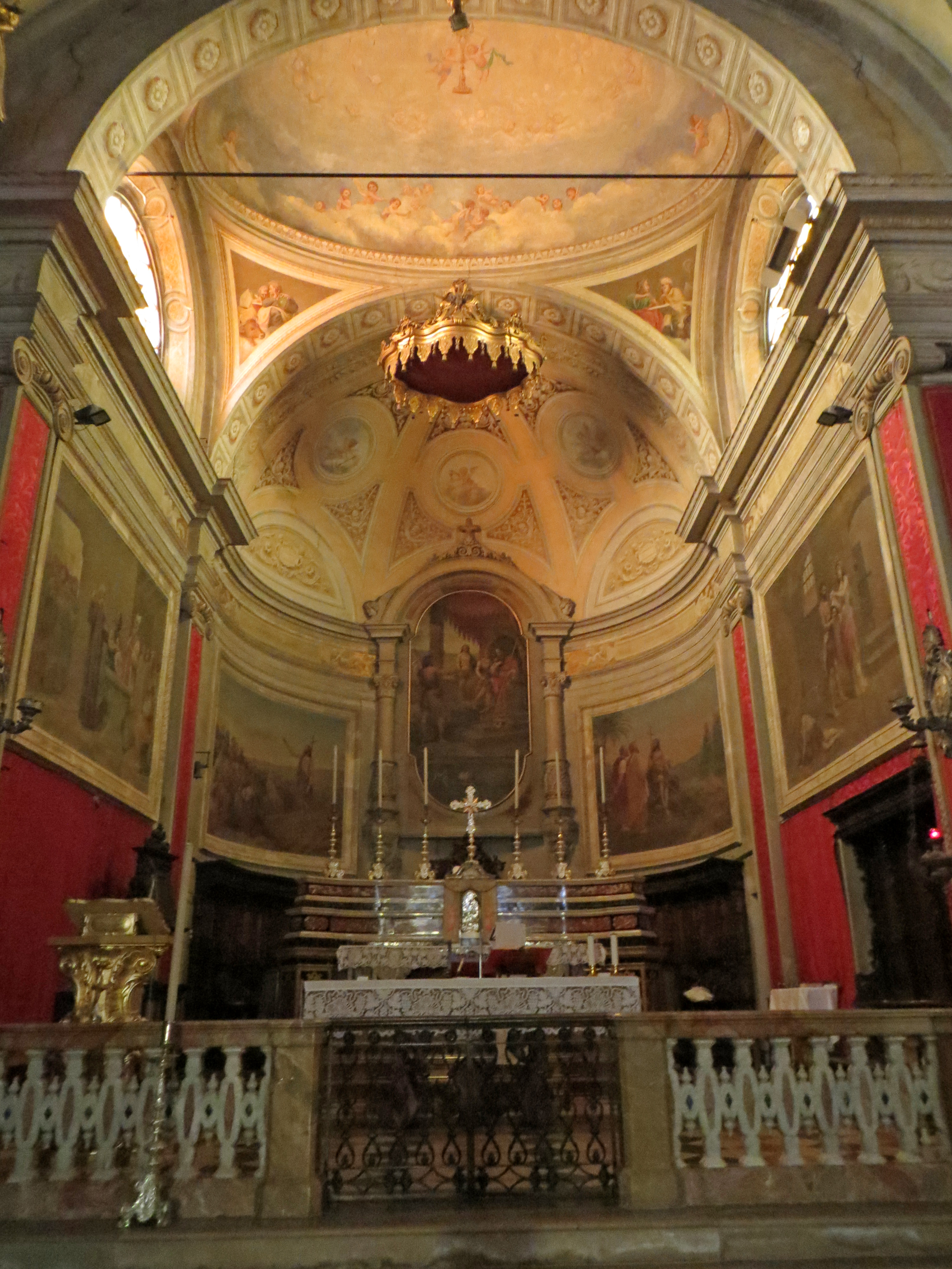 Collegiata di San Giovanni Battista (Pieveottoville, Polesine Zibello) - presbiterio